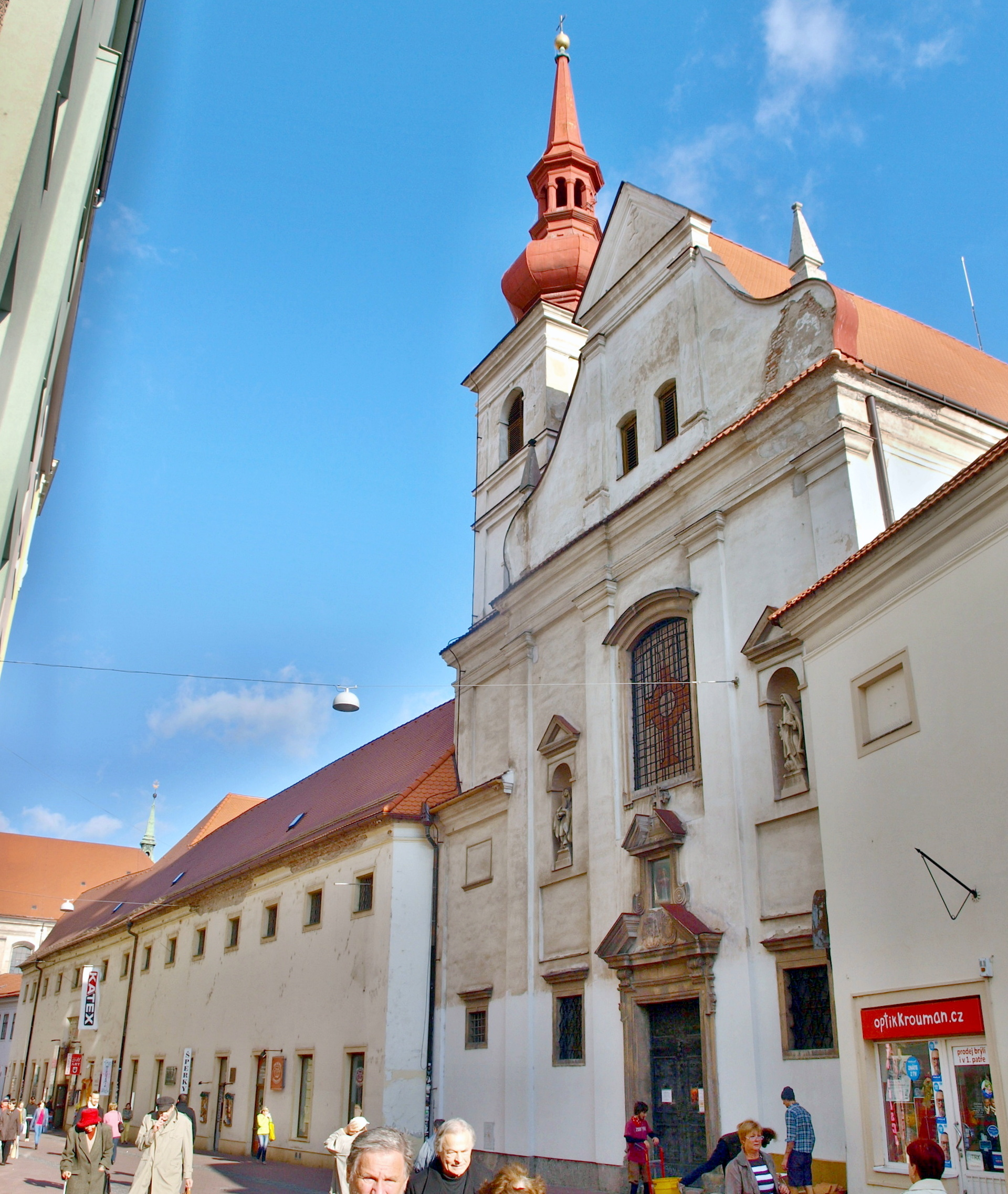 Brno, kostel sv. Josefa